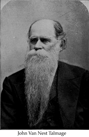 John Van Nest Talmage